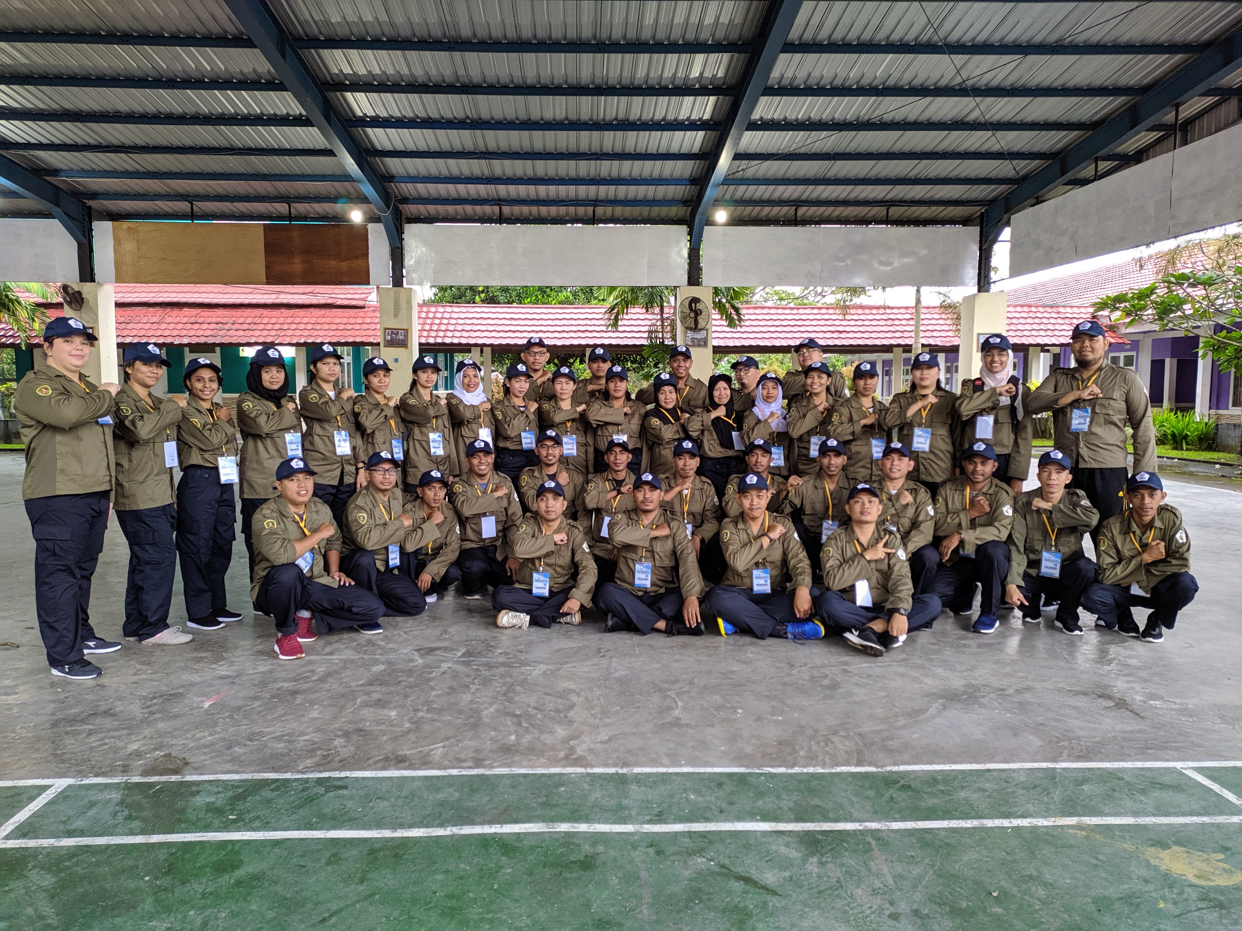 Foto peserta diklat prajabatan Calon Pegawai Negeri Sipil Golongan III Angkatan 5 lingkup Kemenristekdikti dan KPU daerah Maluku tahun 2019